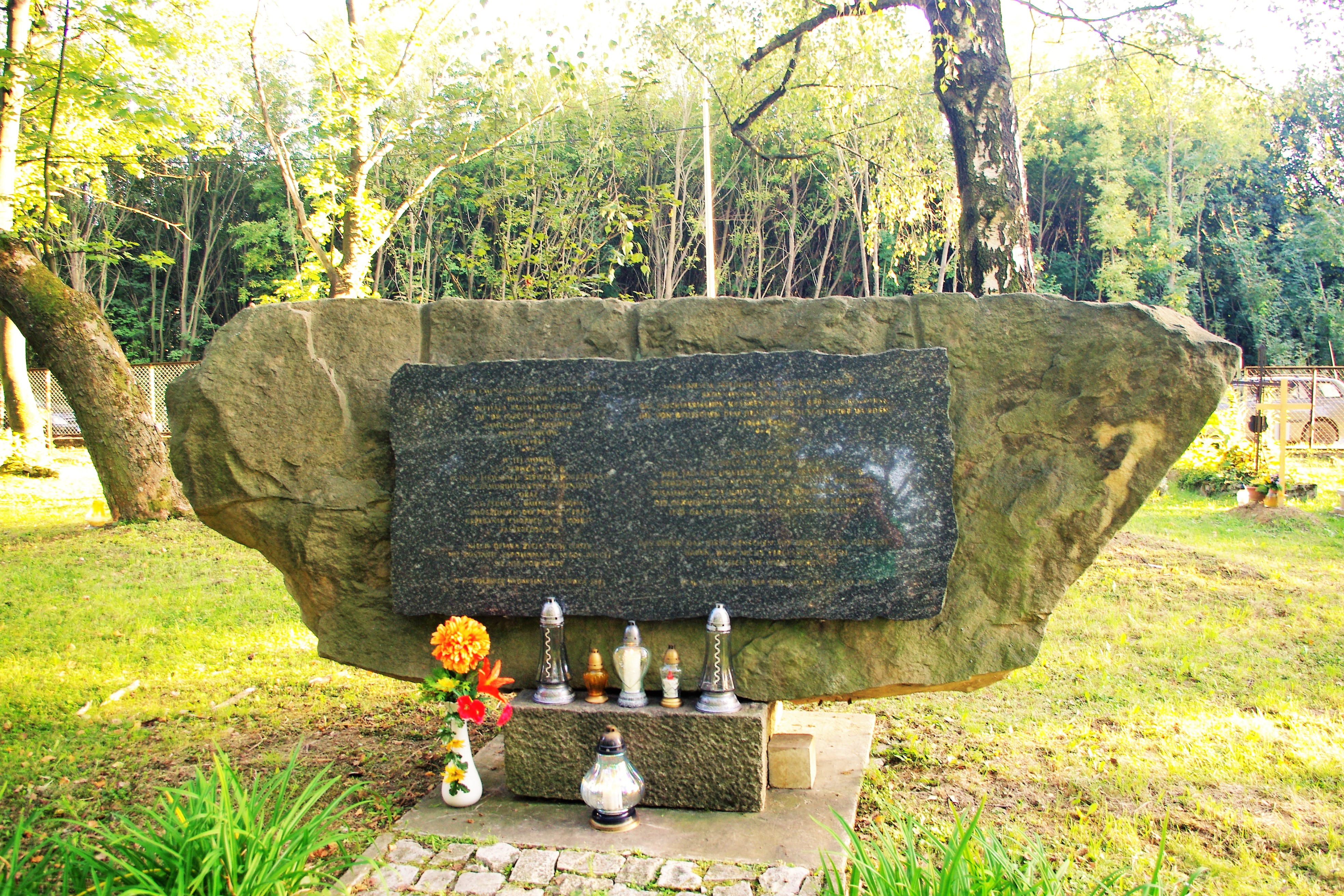 Zbiorowy grobowiec pacjentów Zakładu dla Umysłowo i Nerwowo Chorych w Kobierzynie oraz skawińskich Żydów zamordowanych w czerwcu 1942